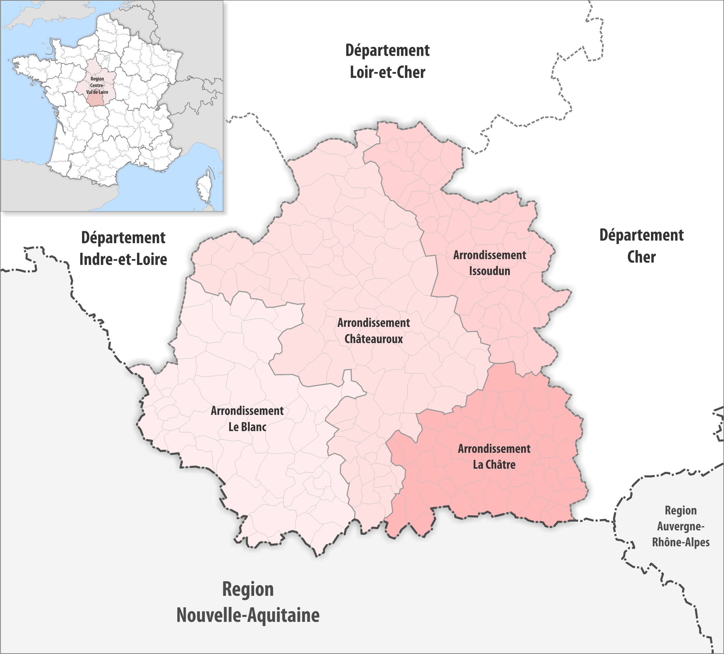 Gemeinden und Arrondissemente im Departement Indre